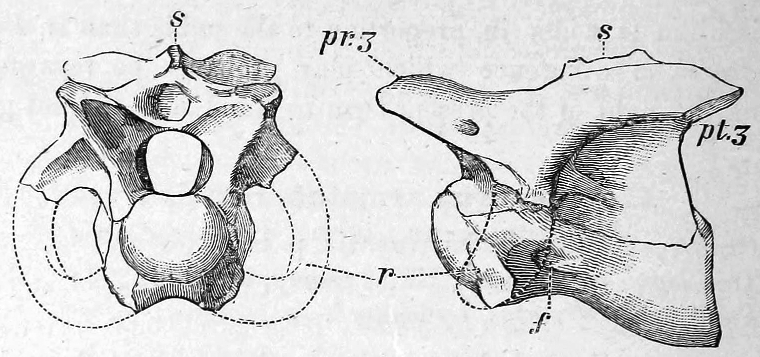 Calamosaurus vertebra.